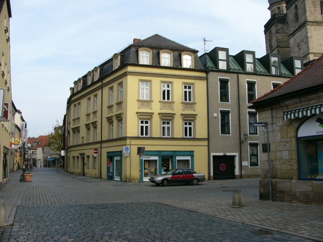 Bayreuth, Sophienstrasse, Standort des ehemaligen Sparnecker Burggutes